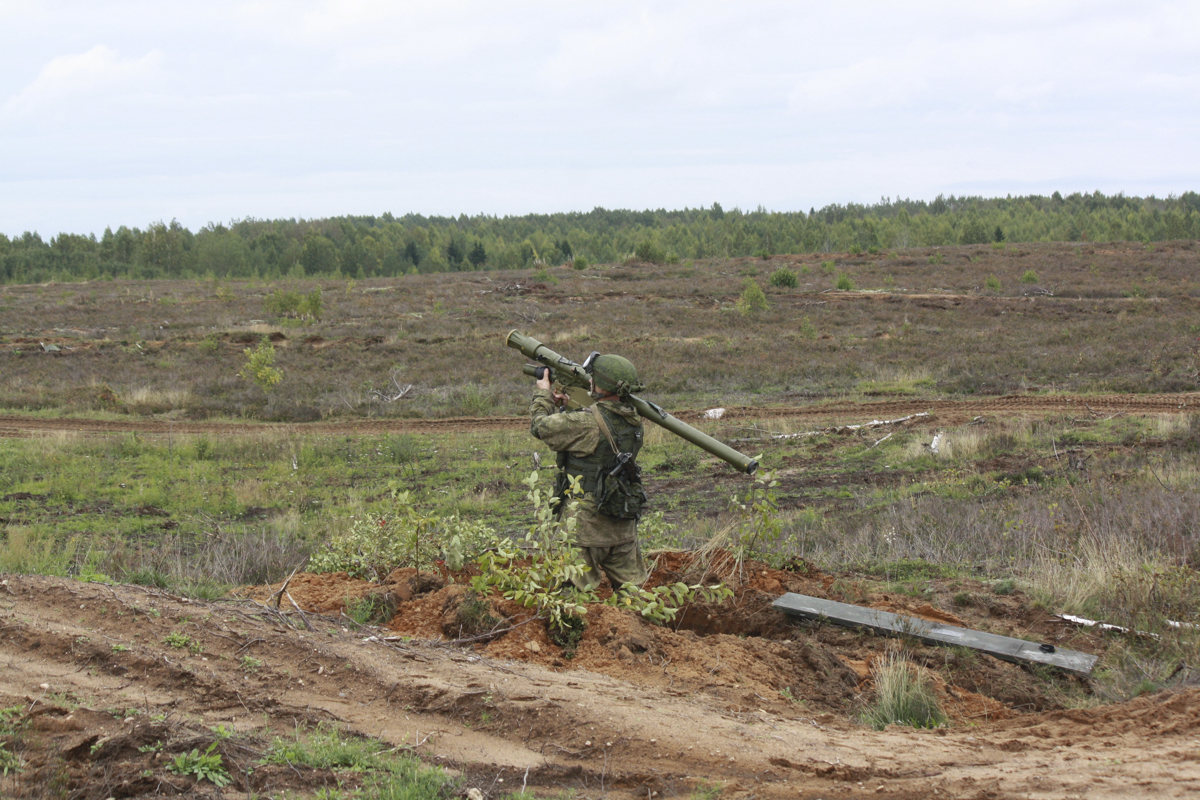 Проведение подразделениями ВДВ России рекогносцировки районов предстоящих учебно-боевых действий в рамках совместного стратегического учения «Запад-2017».